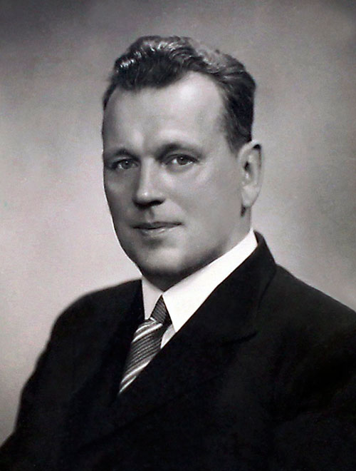 Раскольников, Фёдор Фёдорович